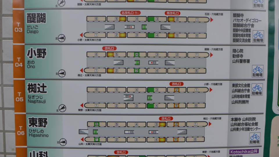 京都市営地下鉄駅ごとの階段、エスカレーター、乗換口ガイド（東西線烏丸御池駅ホームにて）